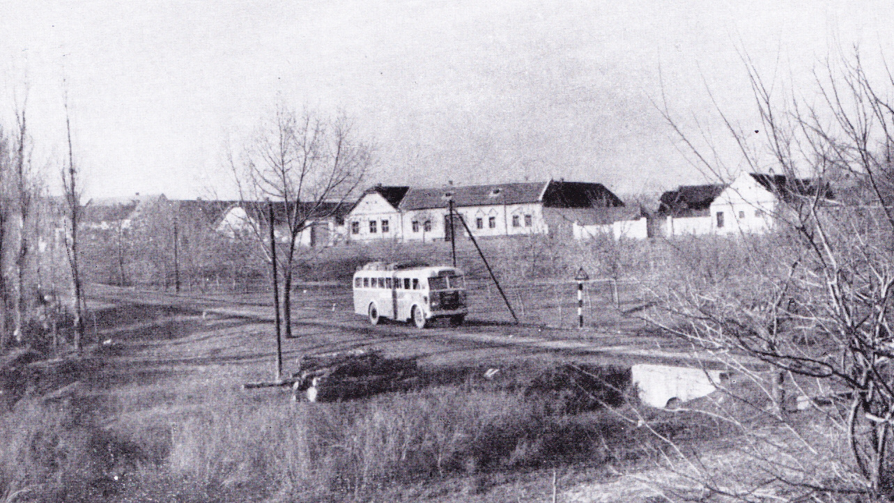 Az 55-ös főút látképe Csávolyon (Dózsa György utca) egy autóbusszal az 1960-as évek közepén